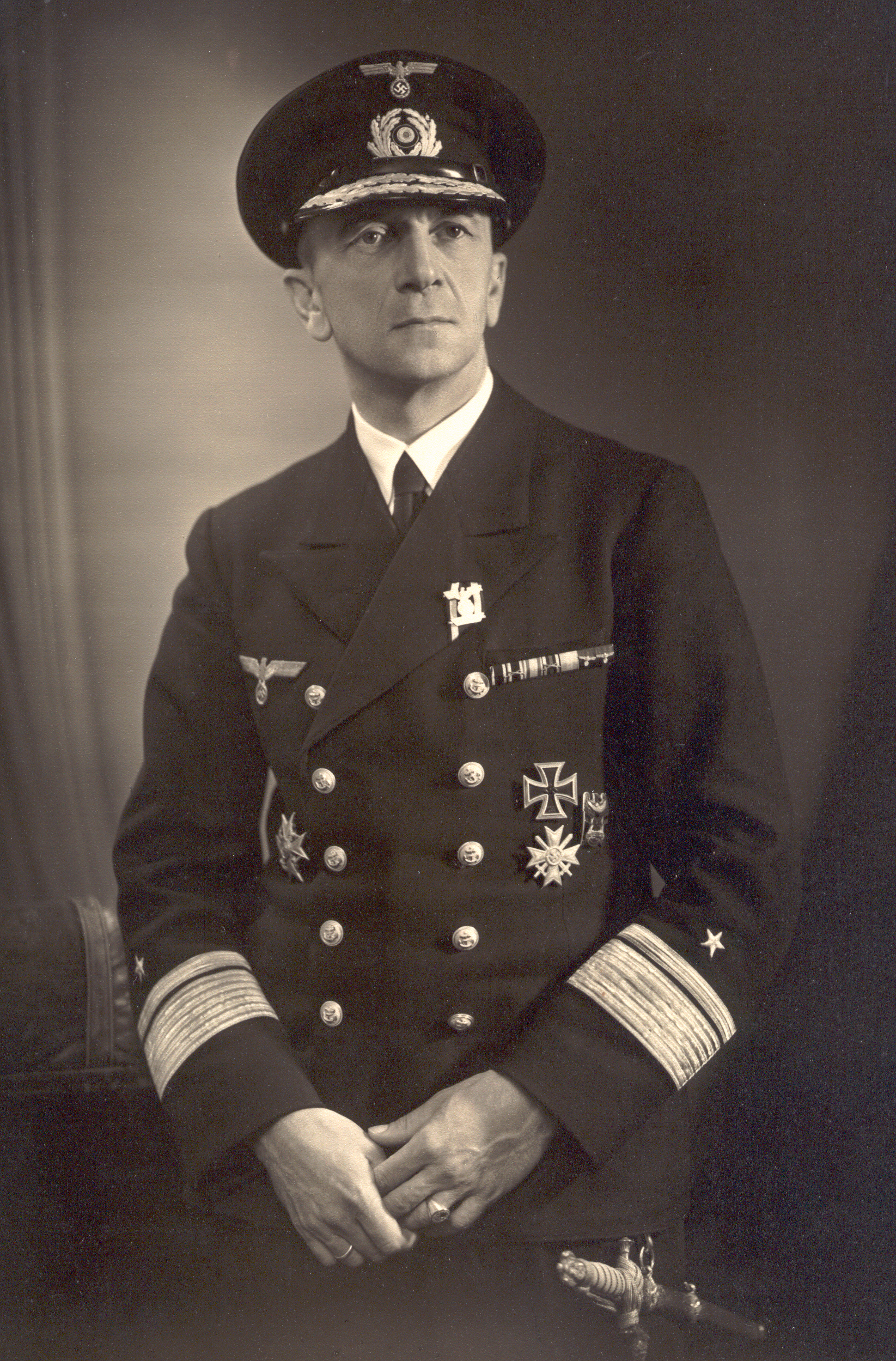 Porträtfotografie von Konteradmiral Waldemar Winther